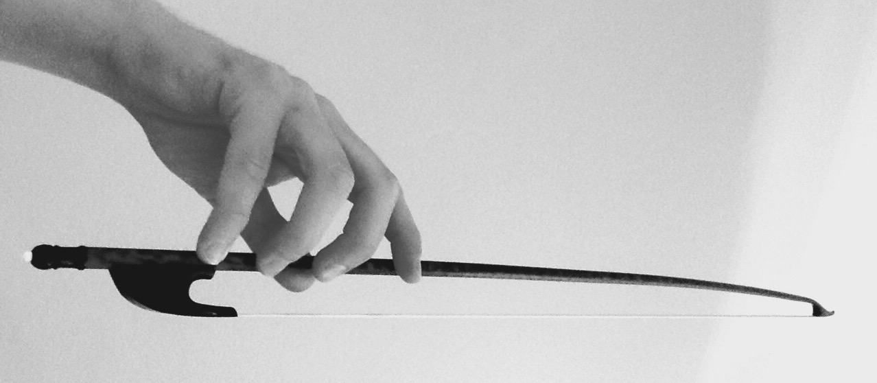 Baroque violin bow holding